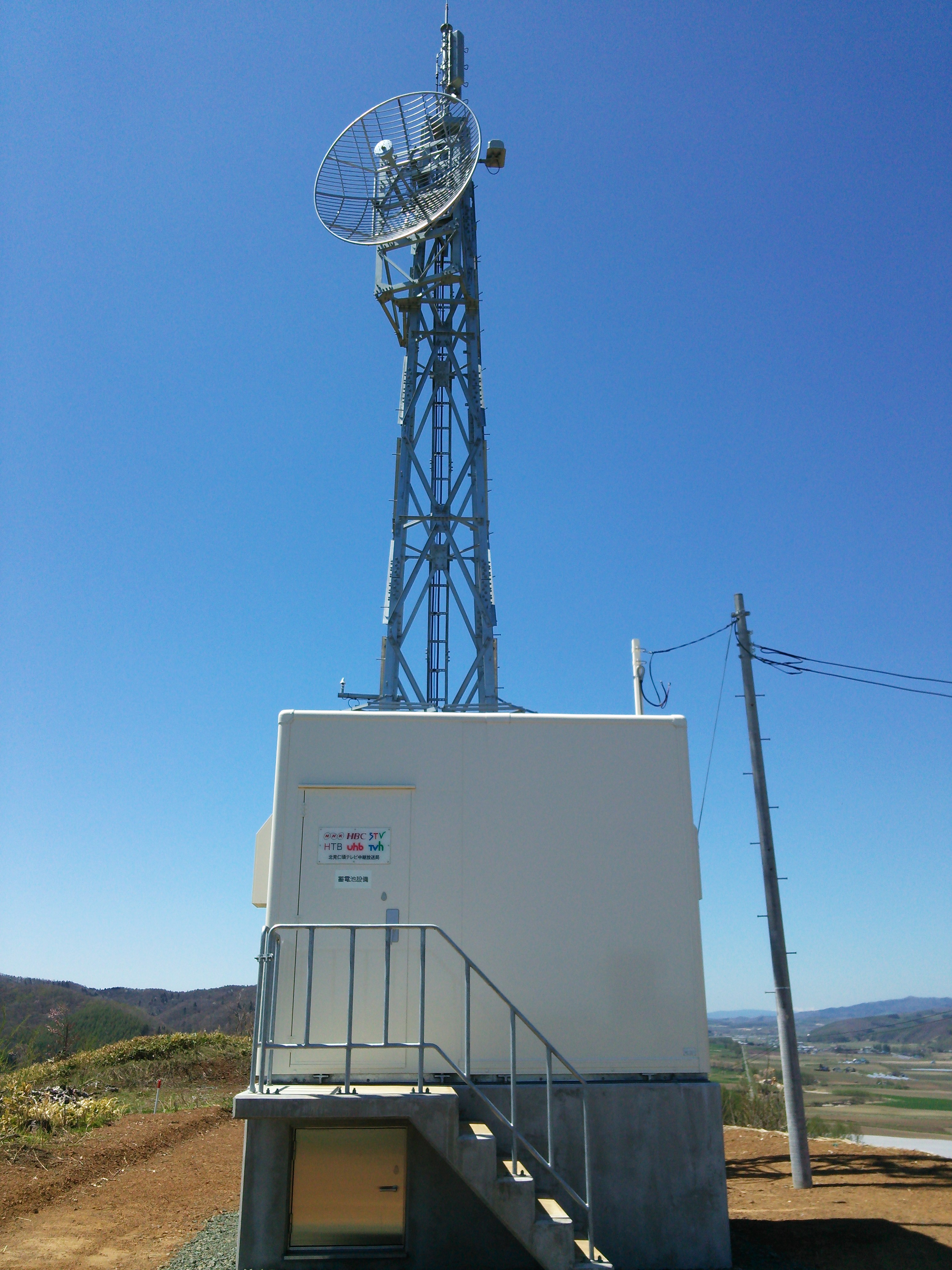 北見仁頃テレビ中継局